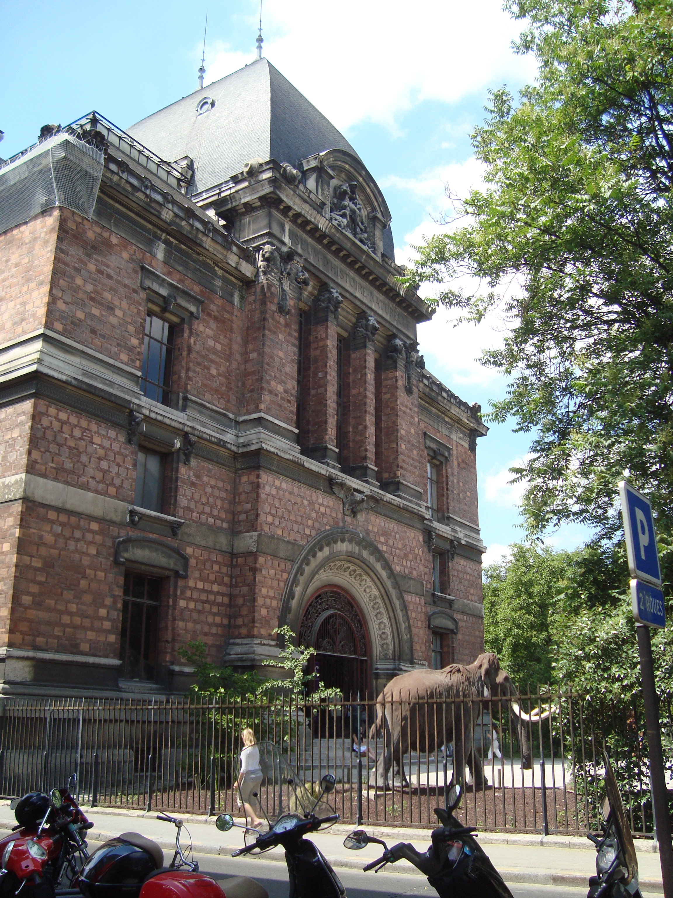 Vue depuis la rue Buffon de la galerie de Paléontologie et d'Anatomie comparée (Muséum national d'histoire naturelle) au Jardin des plantes, à Paris.